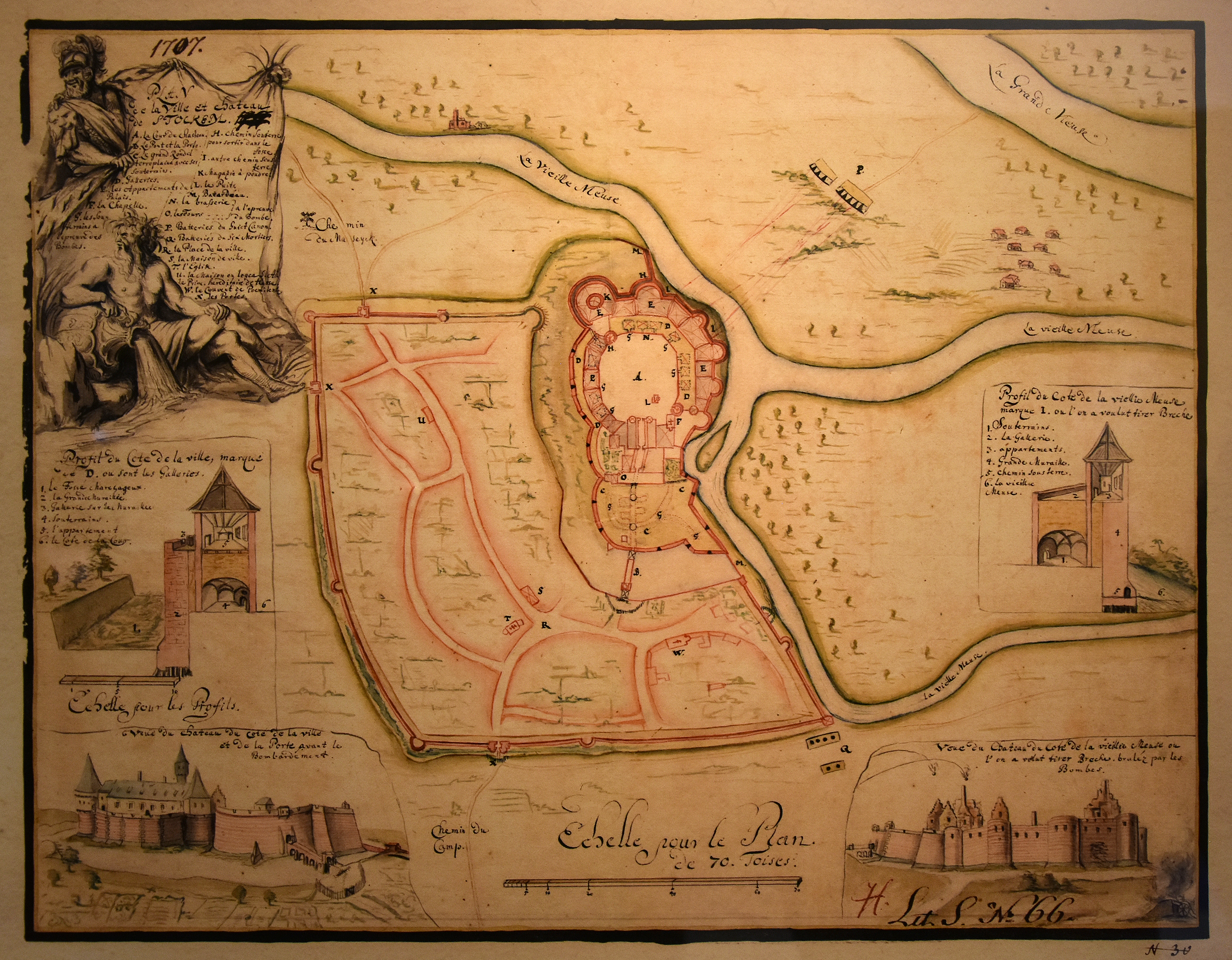 Stokkem kasteel belegering 1702